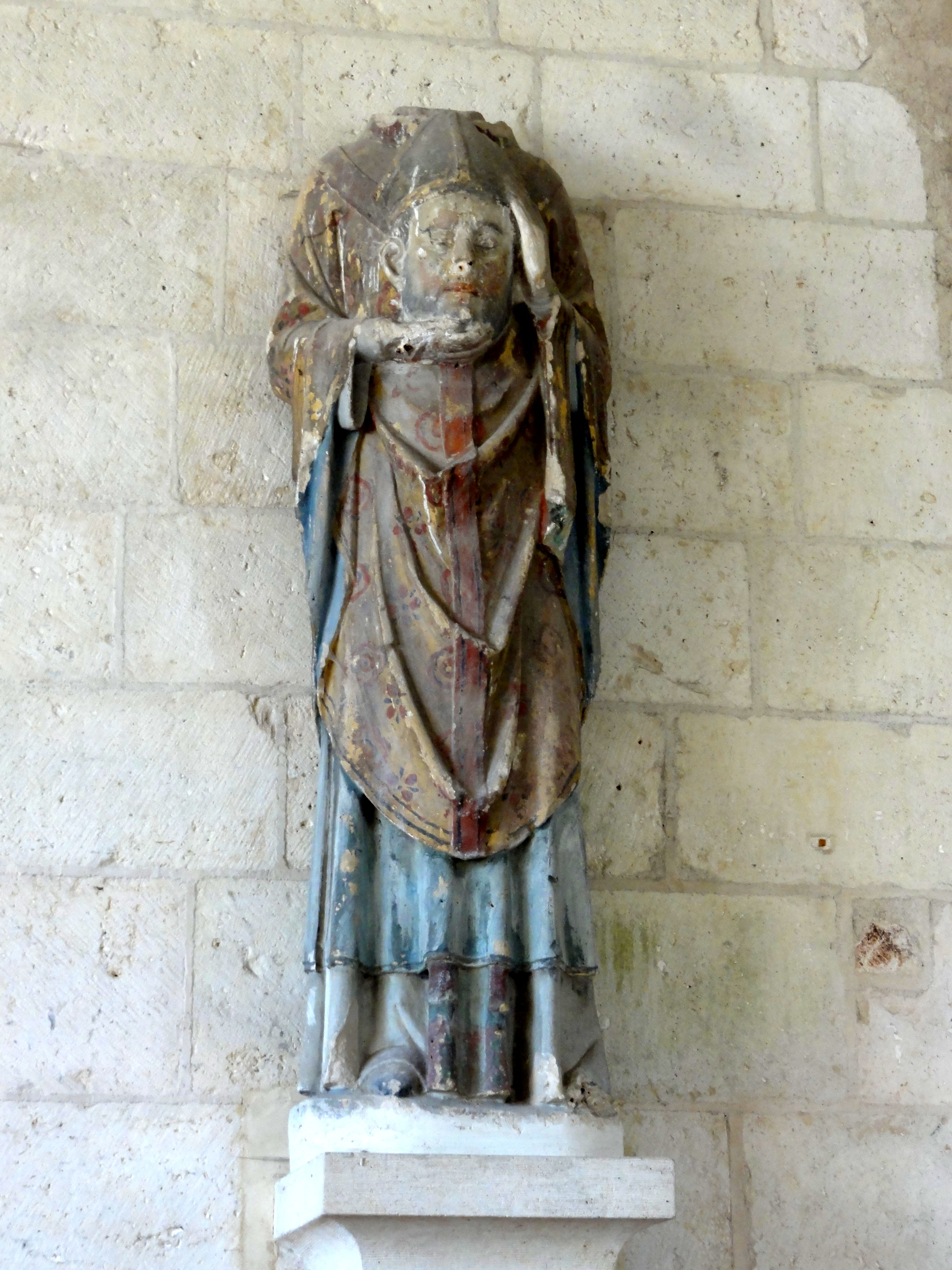 Statue de saint Denis céphalophore.